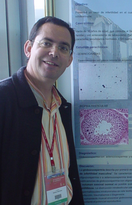 Guirao en abril de 2005